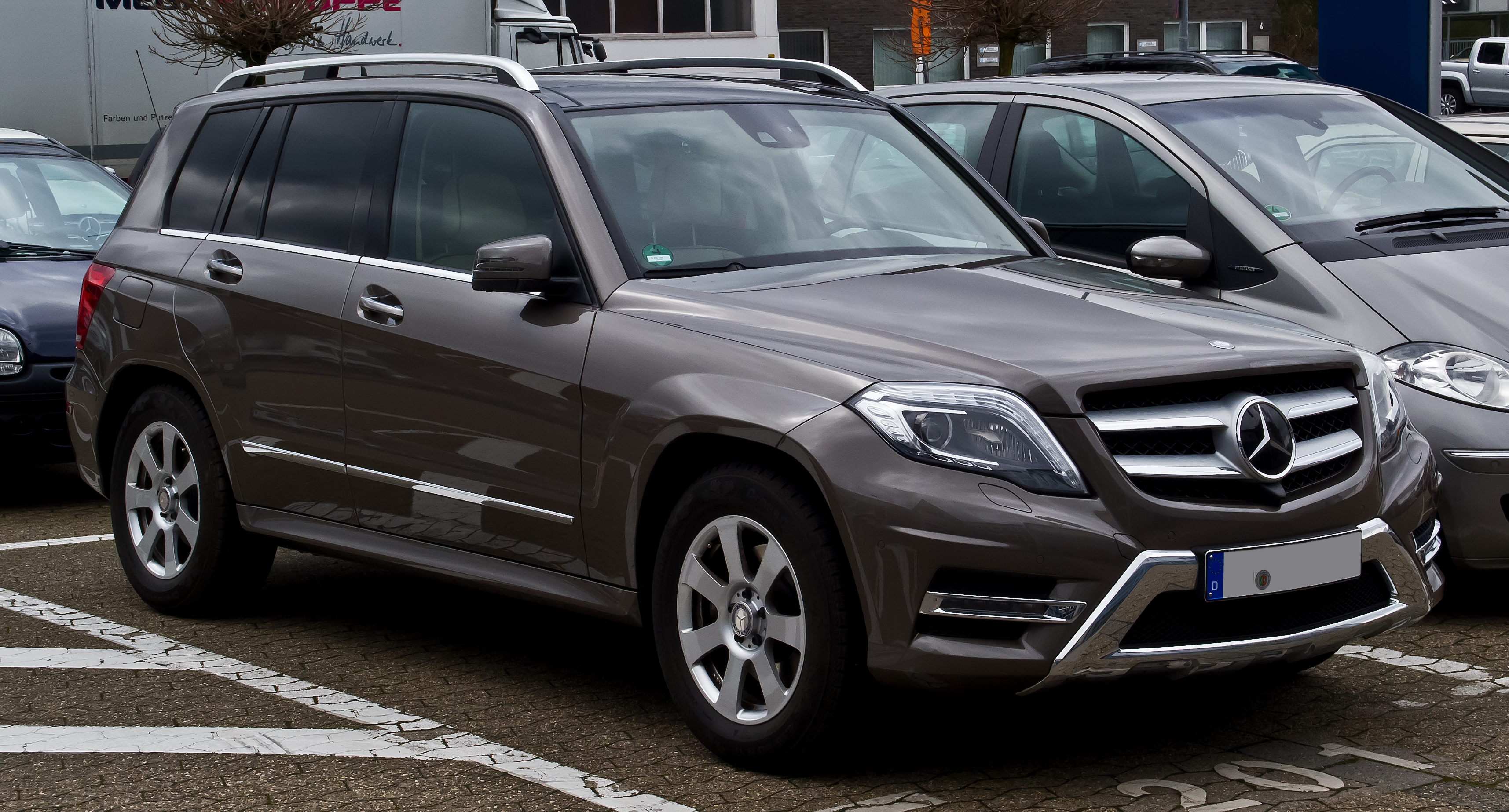 Mercedes-Benz GLK 250 BlueTEC 4MATIC Sport-Paket AMG (X 204, Facelift)